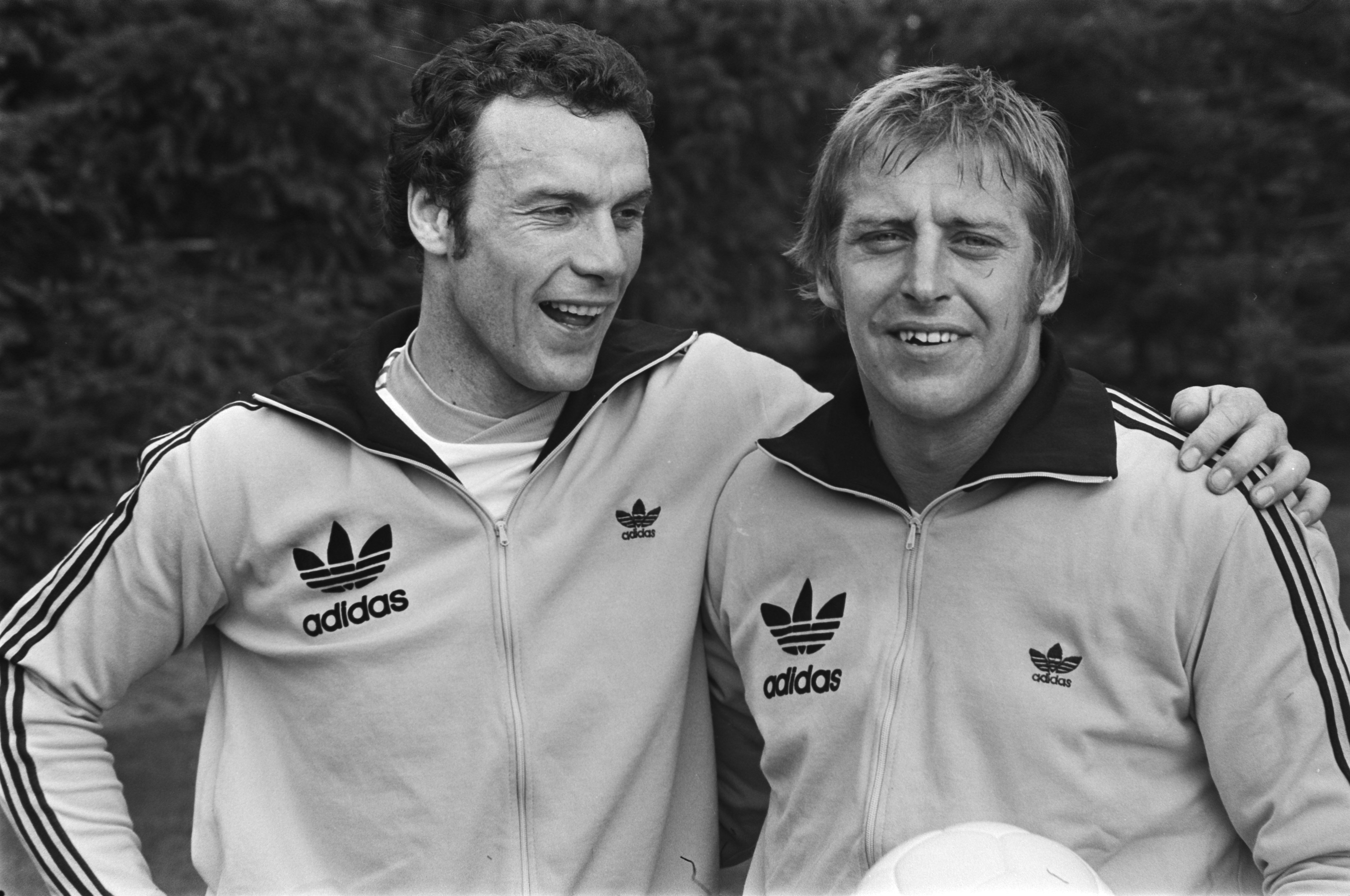 Photographie des gardiens de but Jan Ruiter et Piet Schrijvers par Bert Verhoeff / Anefo.